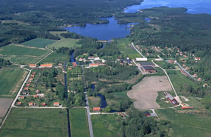 Motiv: Brevens bruk Nyckelord: Flygbilder, Riksintressen Kategori: Bruksmiljö.